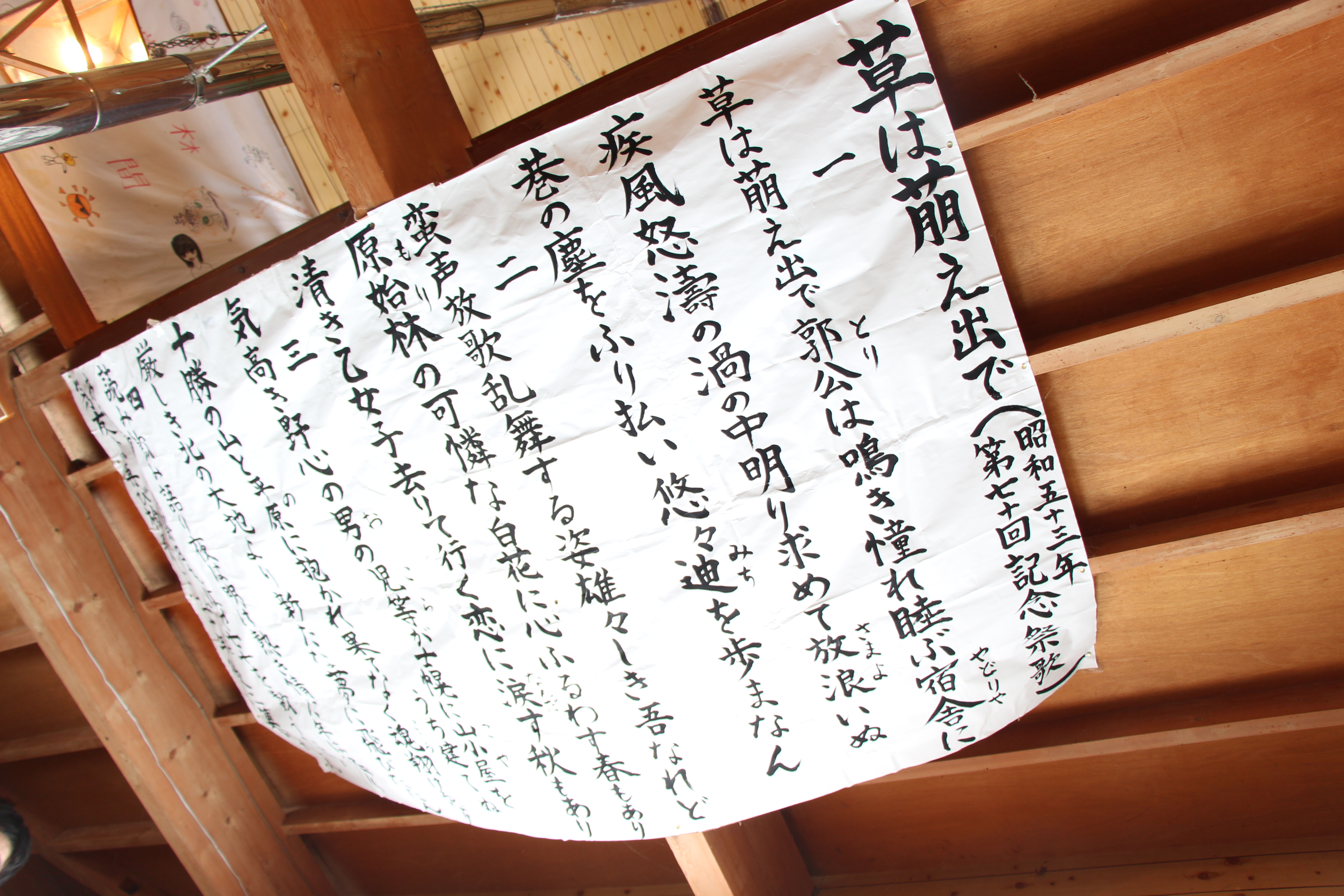 士幌小屋チセ・フレップ内に掲げられている北海道大学恵迪寮の昭和53年第70回記念祭歌「草は萠え出で」の歌詞表示。